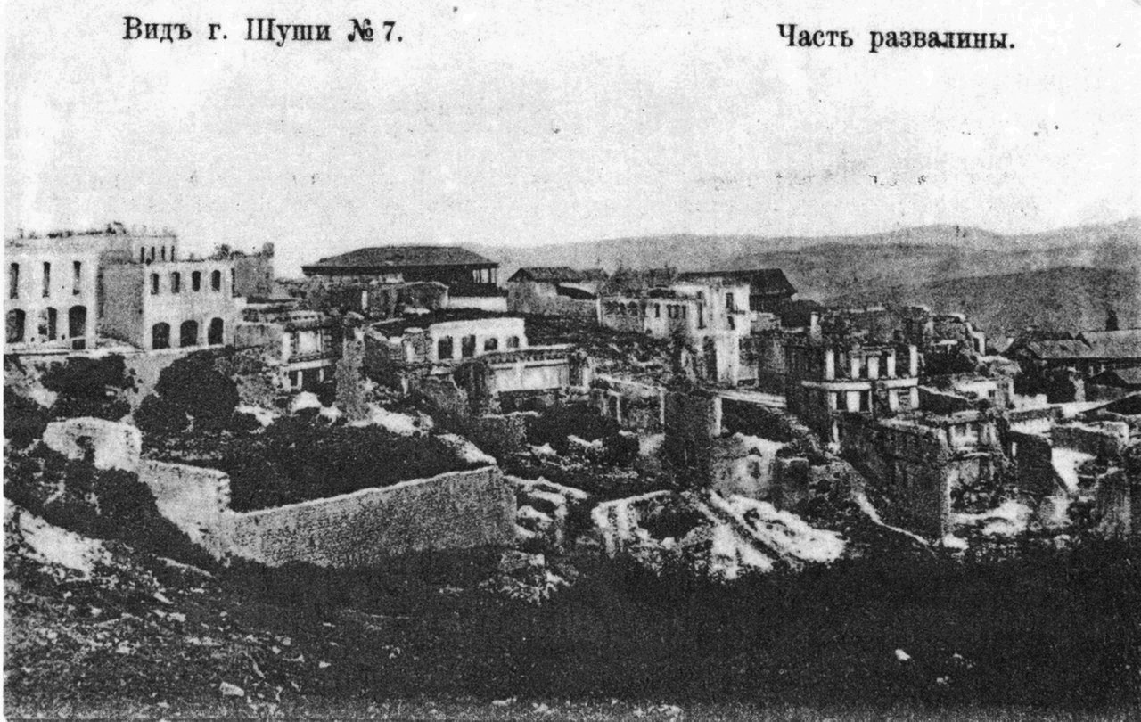 Ruines du quartier arménien de Shusha après les pogroms de 1905